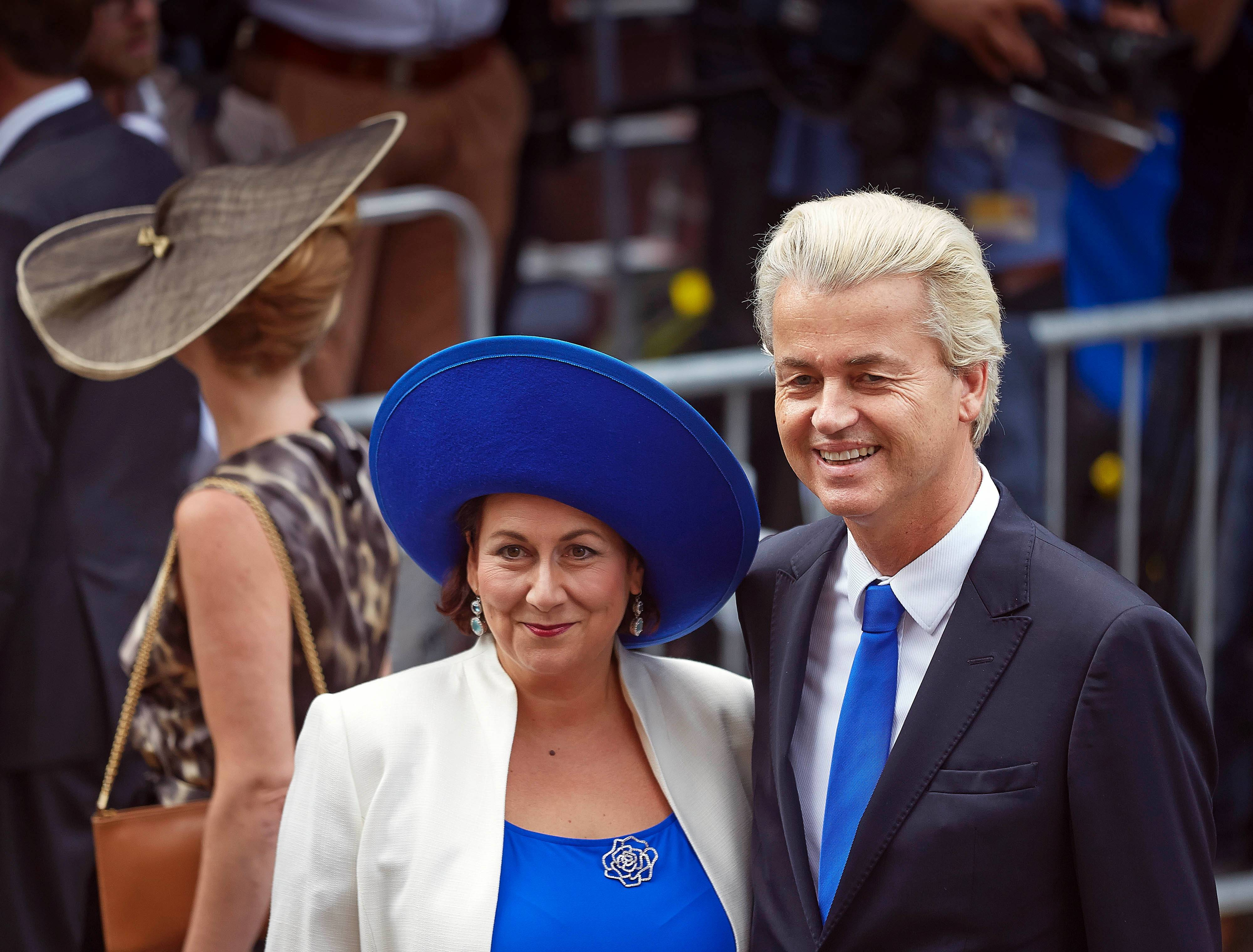 Geert Wilders met zijn vrouw Krisztina Marfai op Prinsjesdag 2014